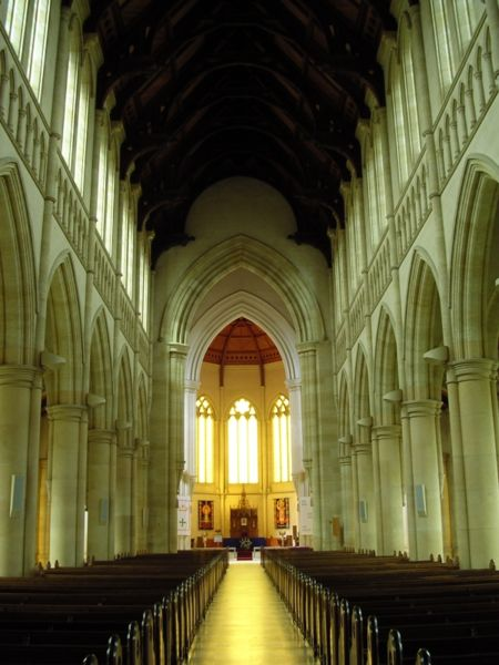 Intérieur de la cathédrale du Sacré-Coeur de Bendigo